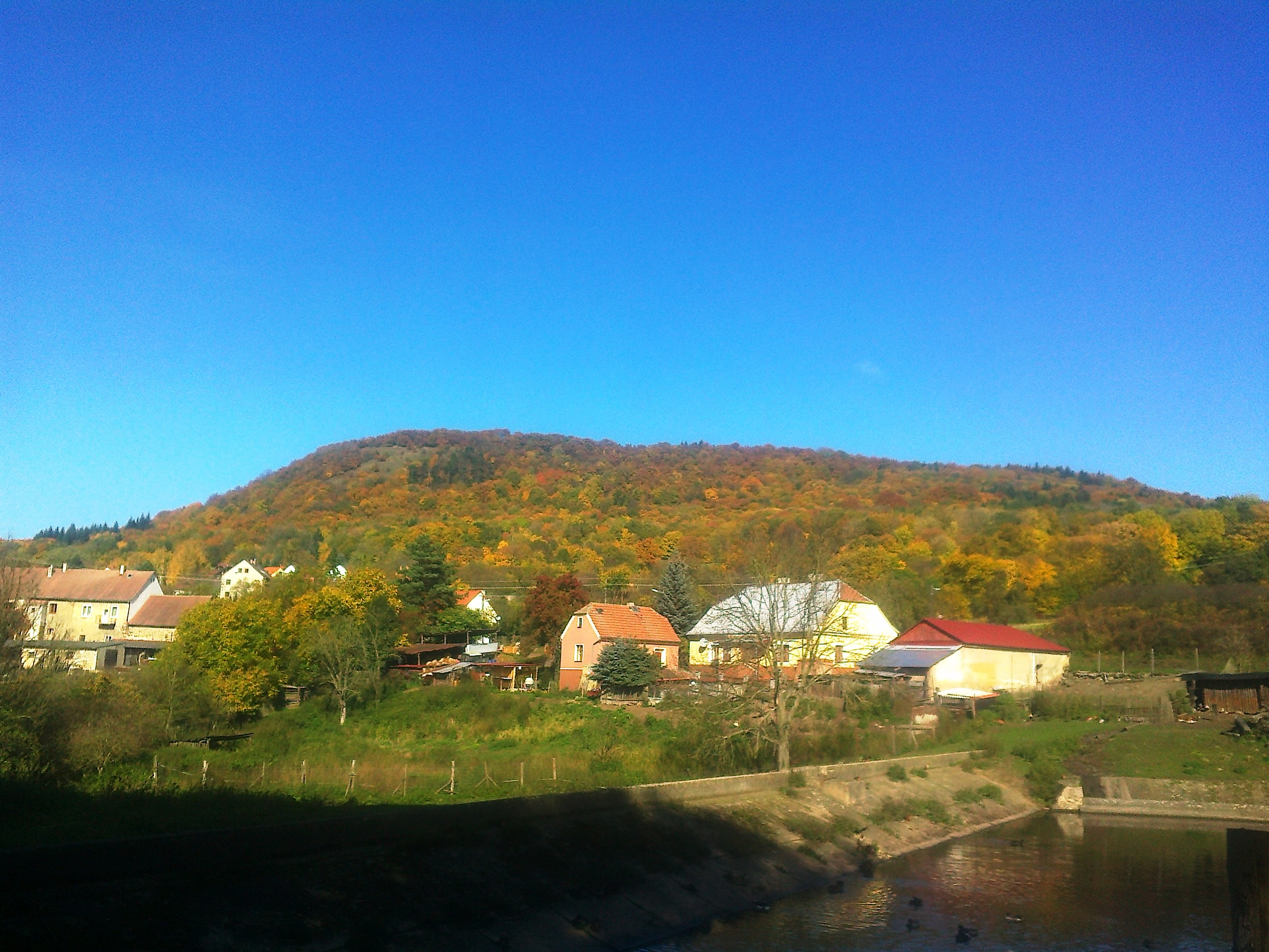 Štěpánovská hora s hradištěm od jihu